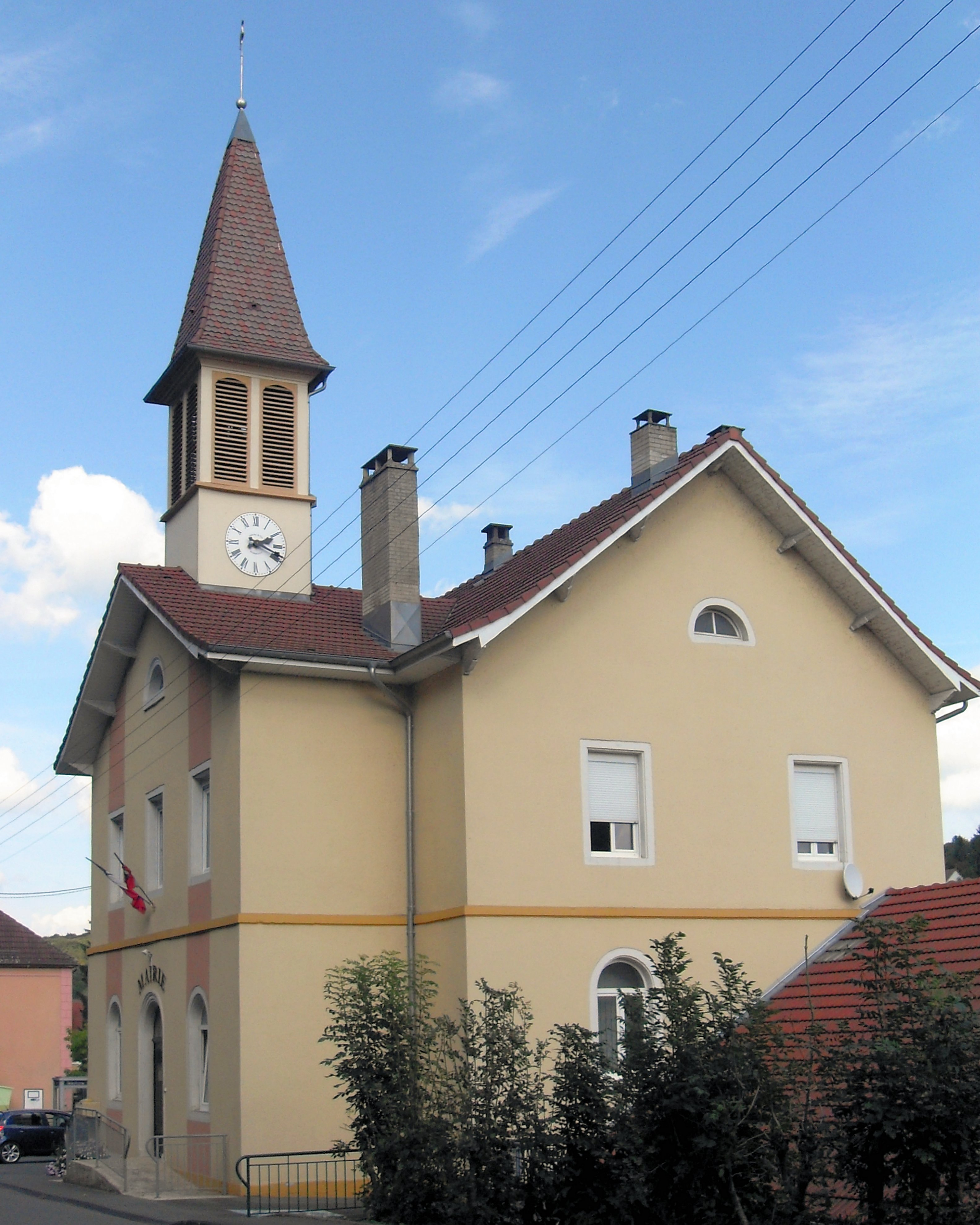 La mairie de Dung